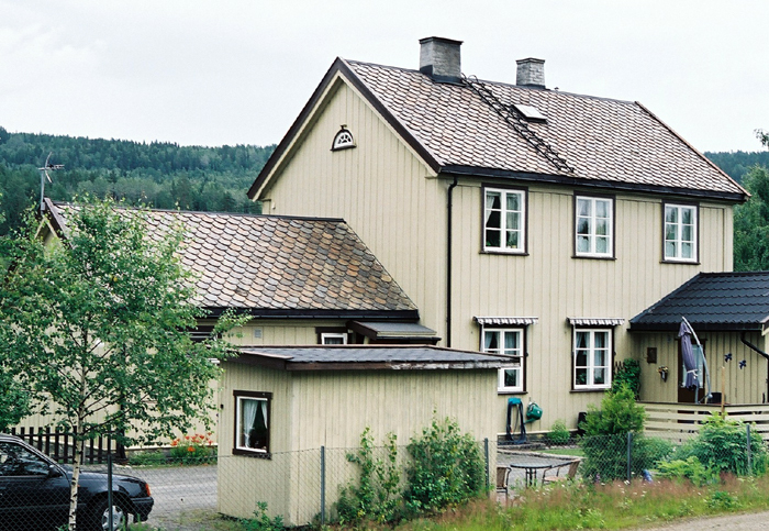 Lampeland stasjon, Numedalsbanen. I dag i privat eie.